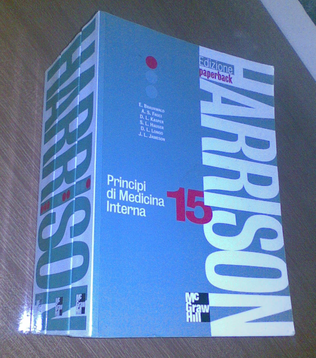 Harrison - Principi di medicina interna XV edizione in lingua italiana